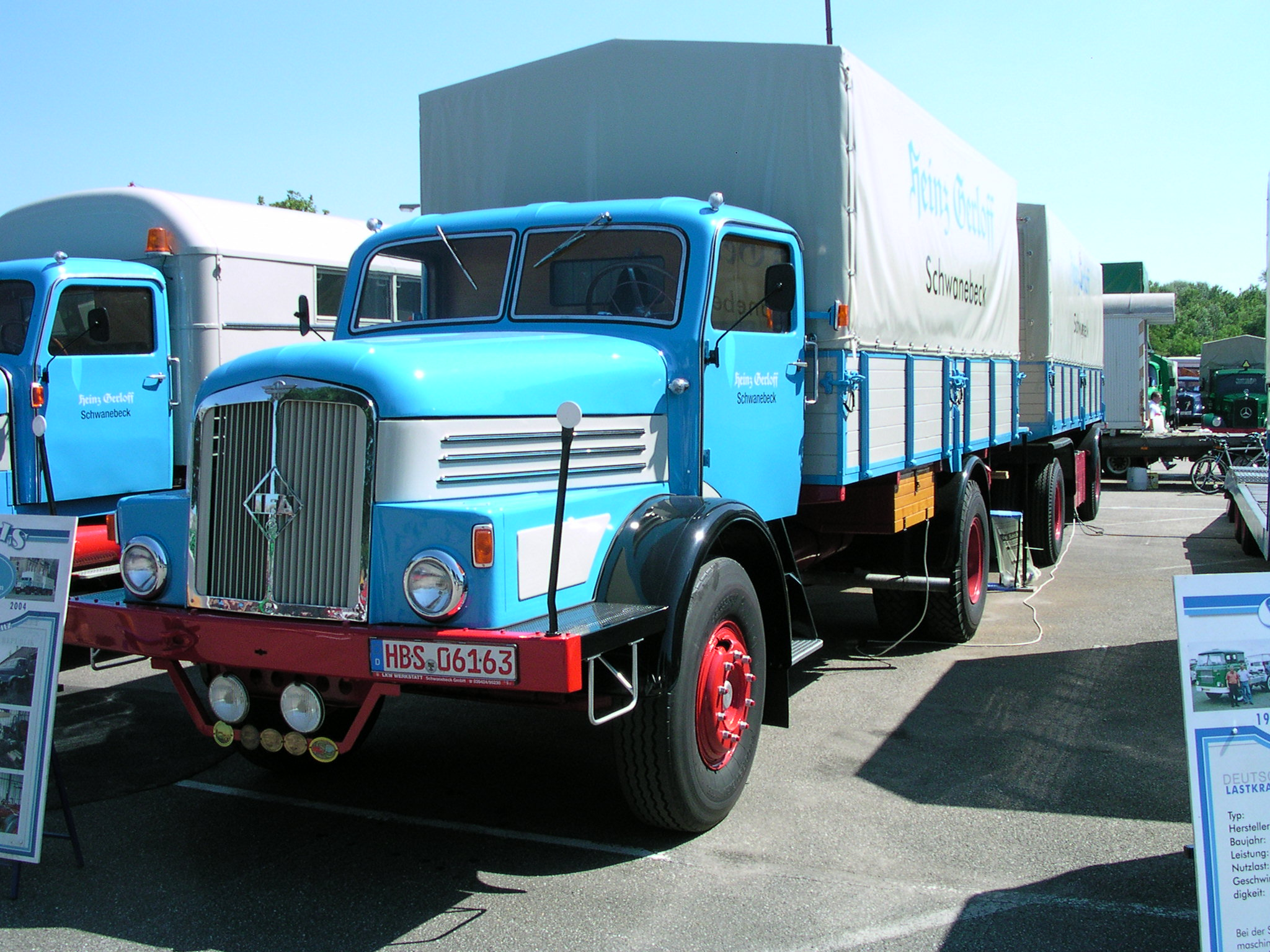 großes Oldtimertreffen im Mercedes-Werk in Wörth am Rhein 2006